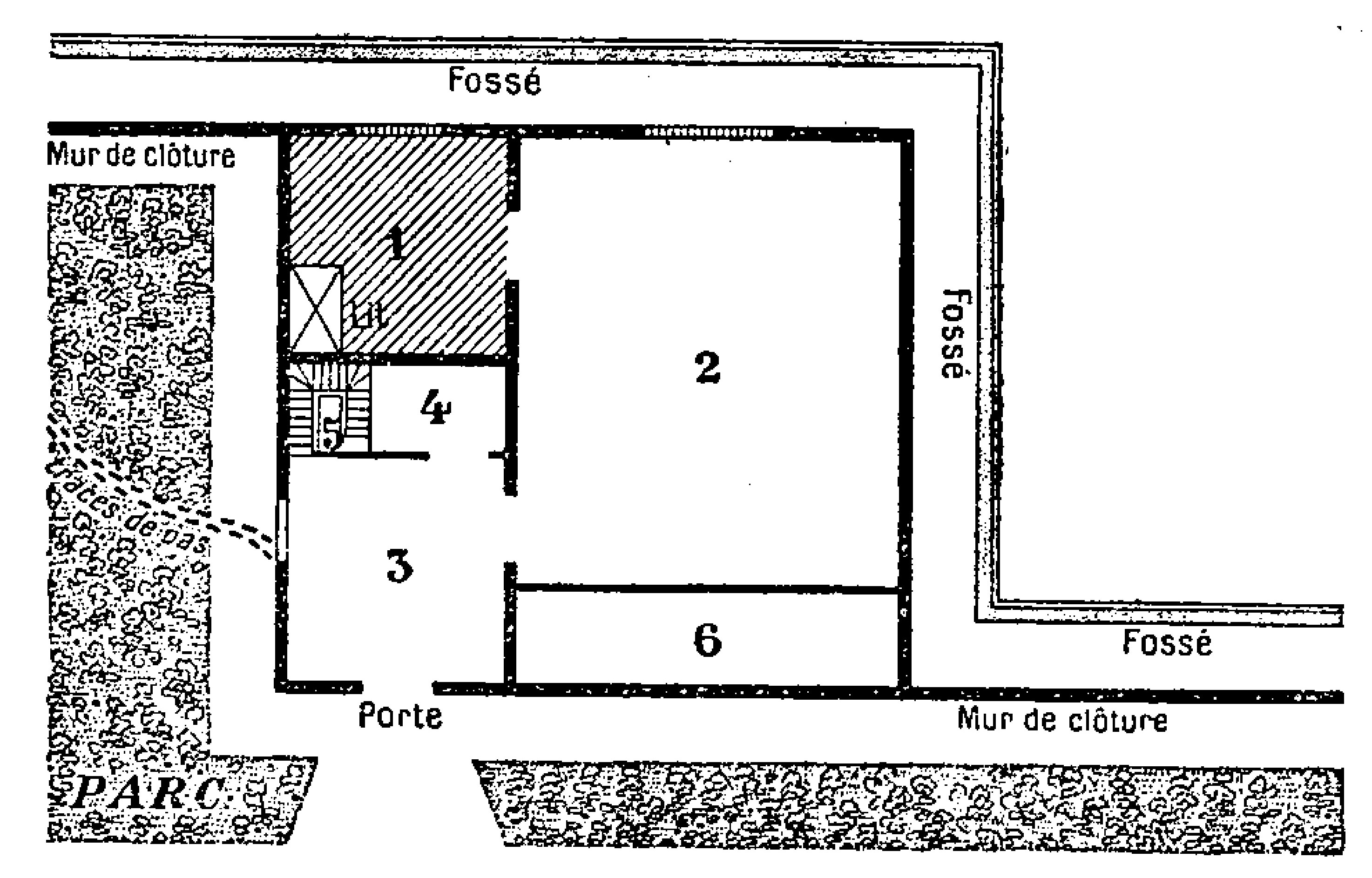 Livre pour Wikisource